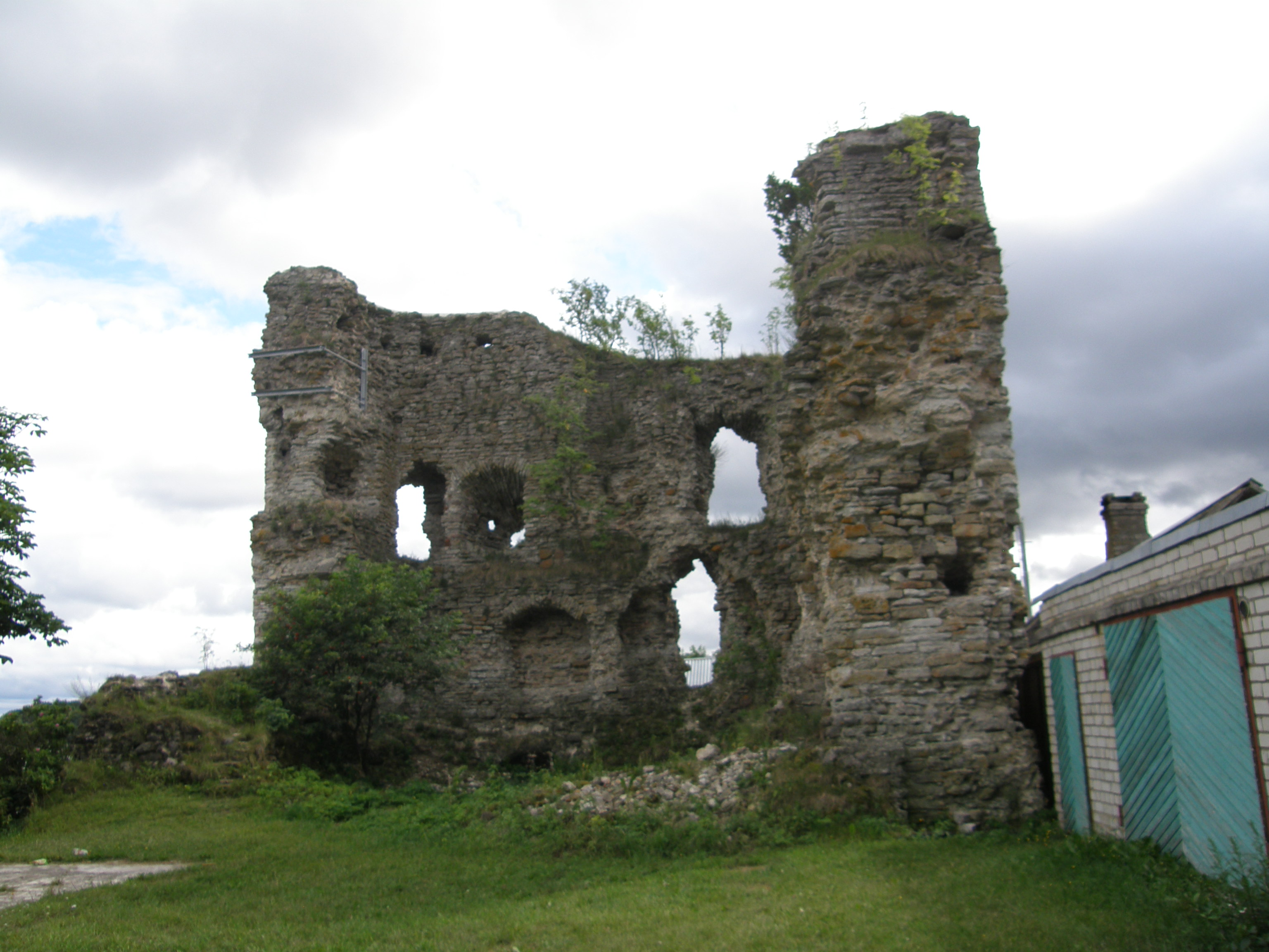 Vasknarva linnuse varemed